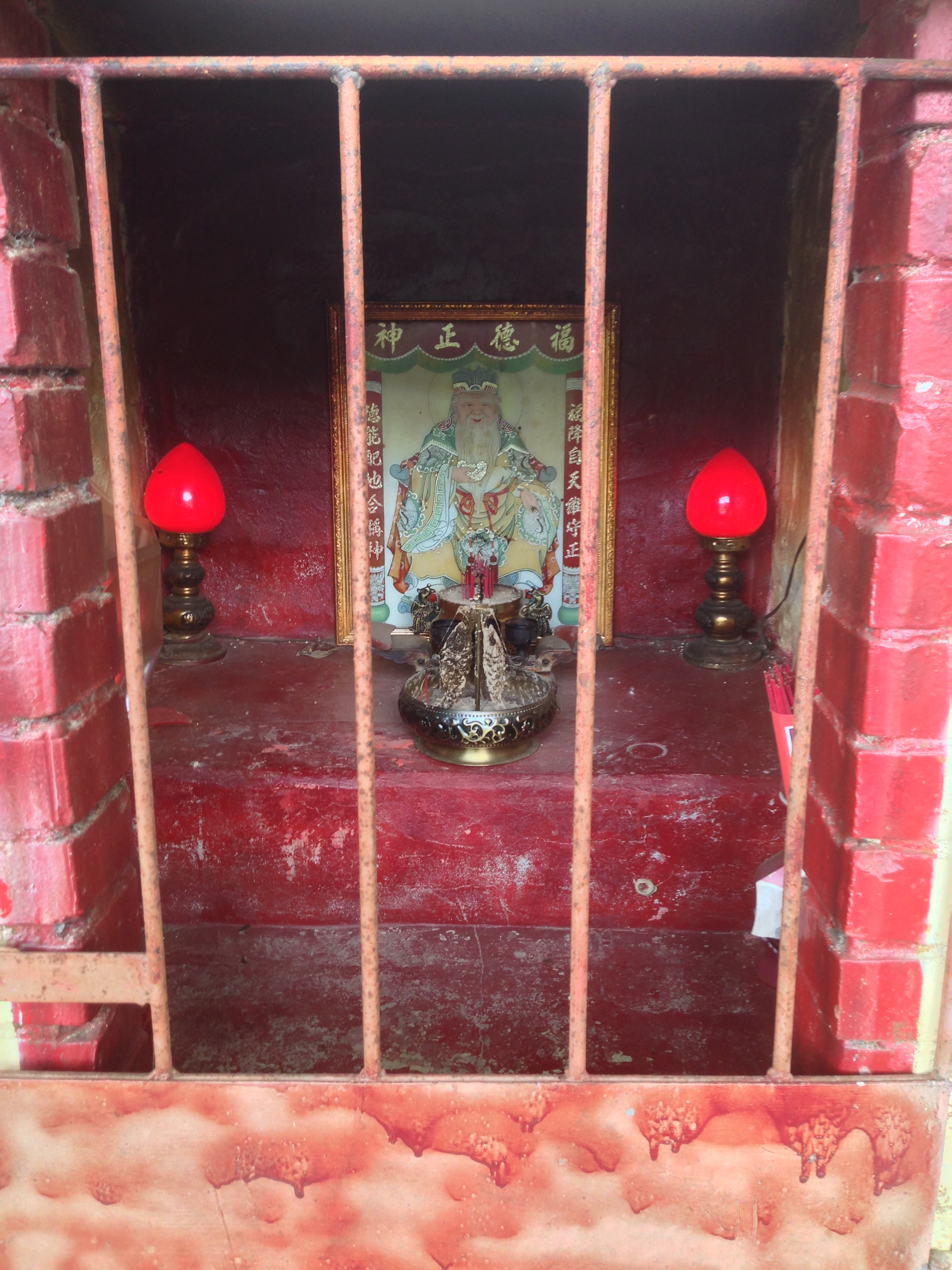 中文（台灣）: 小林福德正神廟神像